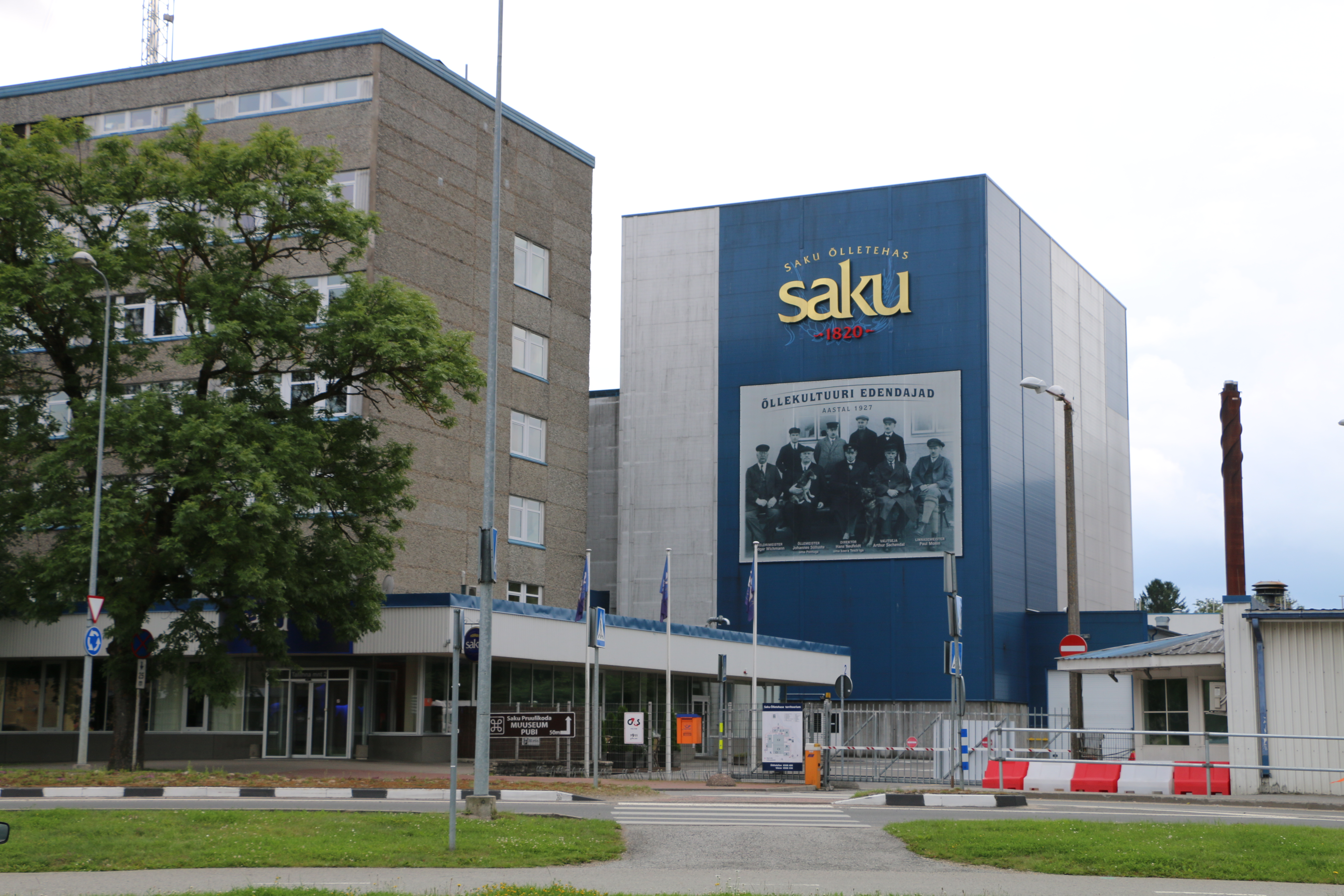 Saku Õlletehas Õlletehase peatuse poolt